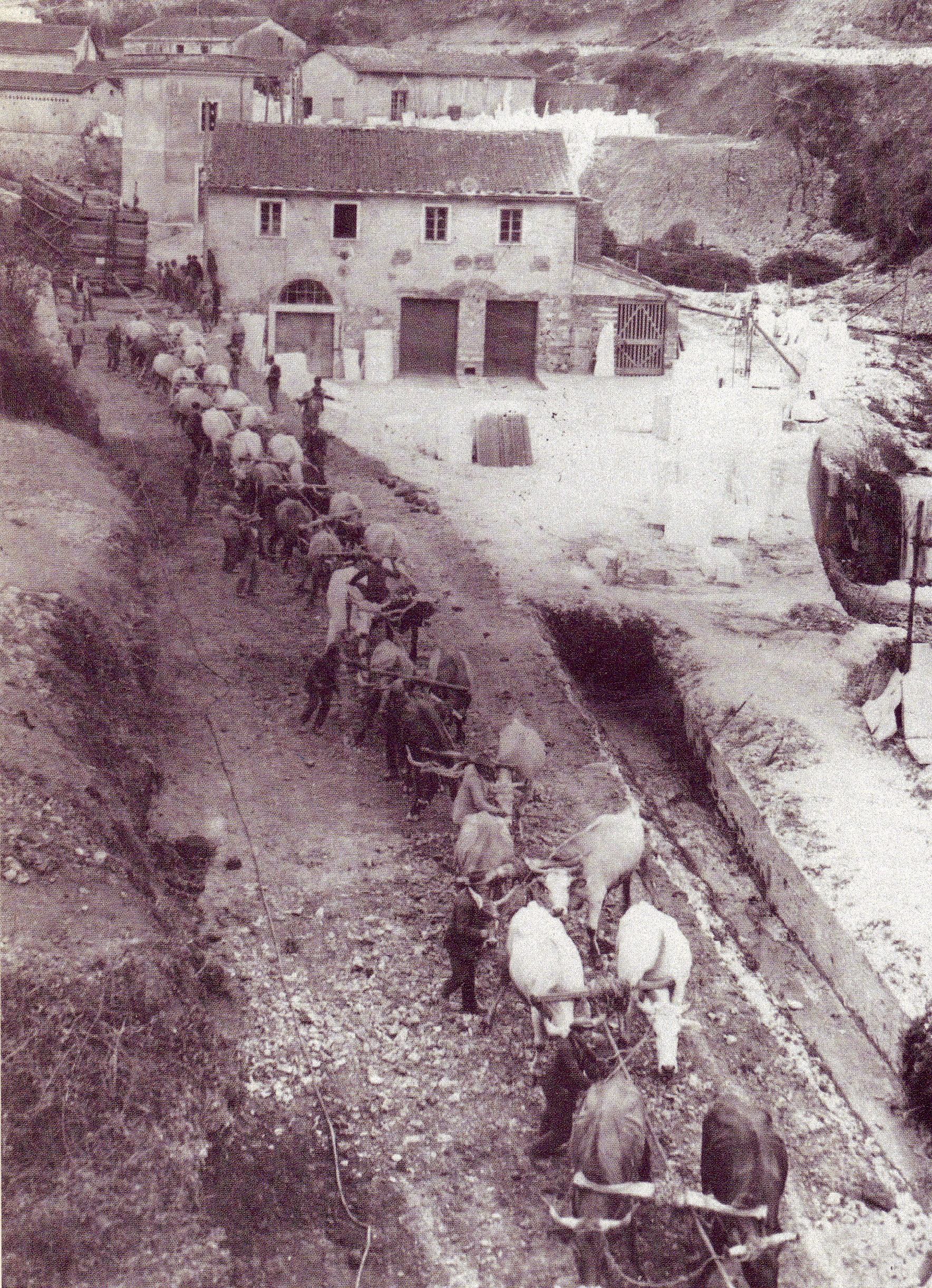 Trasporto verso il mare del monolite del Foro Italico a Roma da intitolare a Benito Mussolini. Imbarcato su un pontone e rimorchiato fino a Fiumicino, il pontone risalì poi lungo il Tevere rimorchiato dalla riva dai buoi. Fu l'ultimo grande trasporto fluviale visto a Roma.